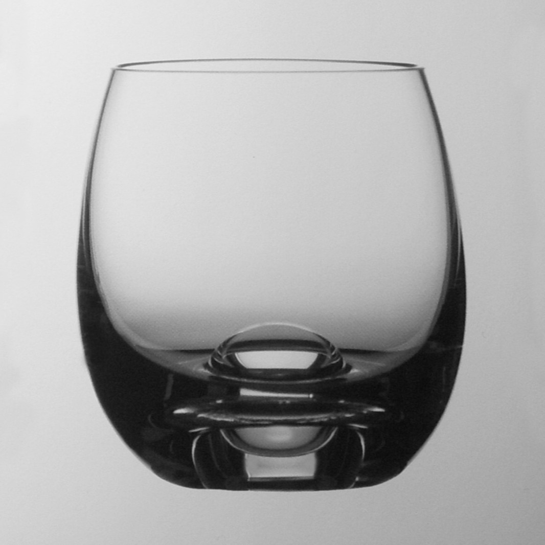 Holmegaard "Platin"